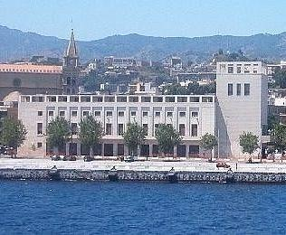 Palazzo del Catasto, ex palazzo Littorio(Giuseppe Samonà)